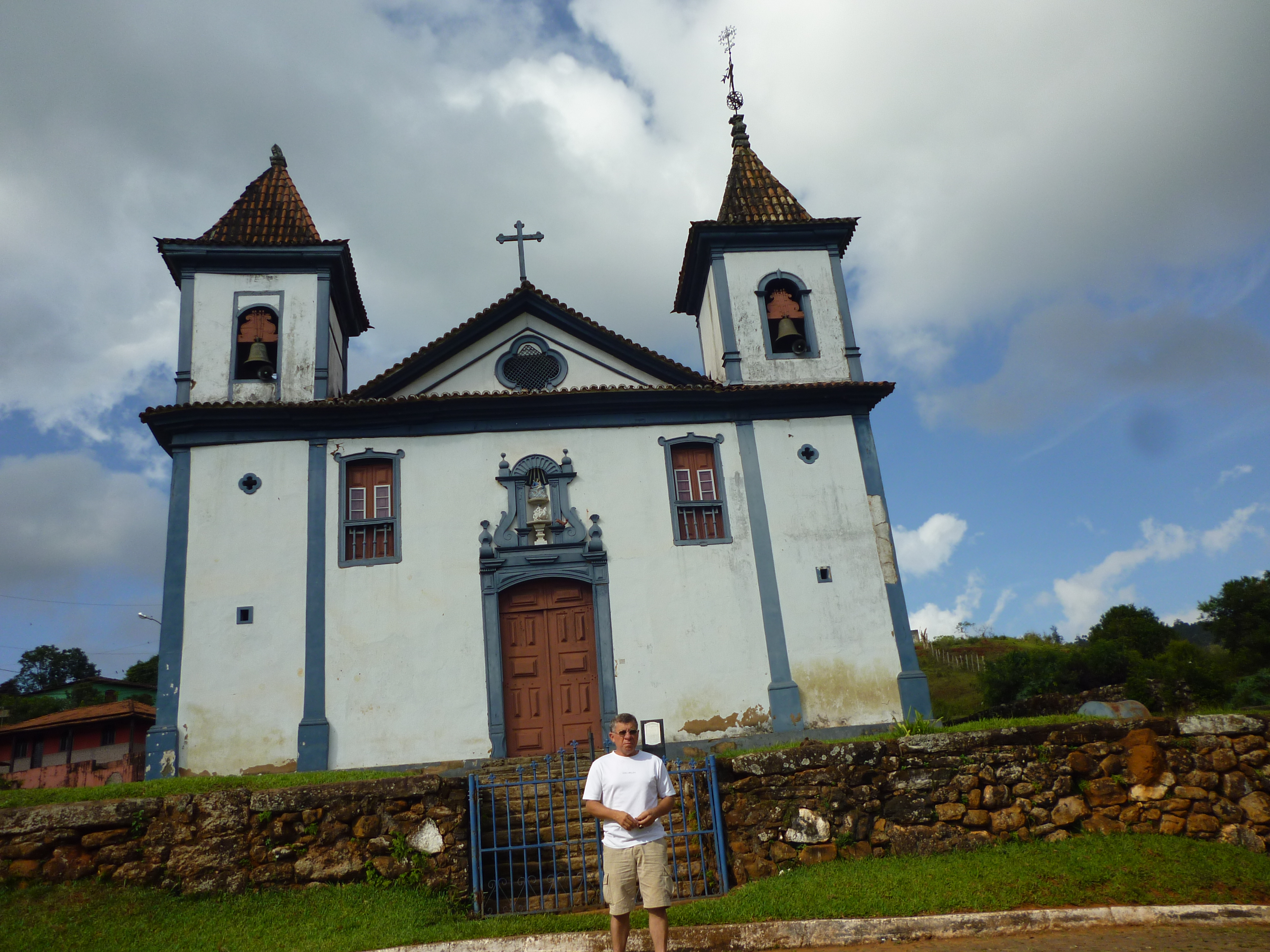 Santa Rita Durão, Mariana MG Brasil - Igreja N. S. de Nazaré